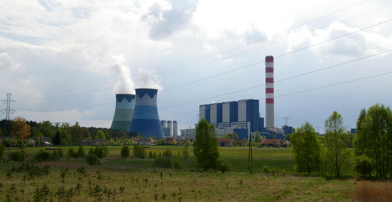 Elektrownia Opole w Brzeziu.